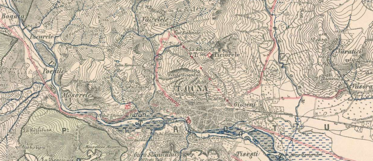 Târgu Ocna la sfârșitul secolului al XIX-lea. Se poate observa funicularul între Gara Mare și ascensorul Salinei, ce a funcționat între 1 februarie 1885 - 30 octombrie 1896.